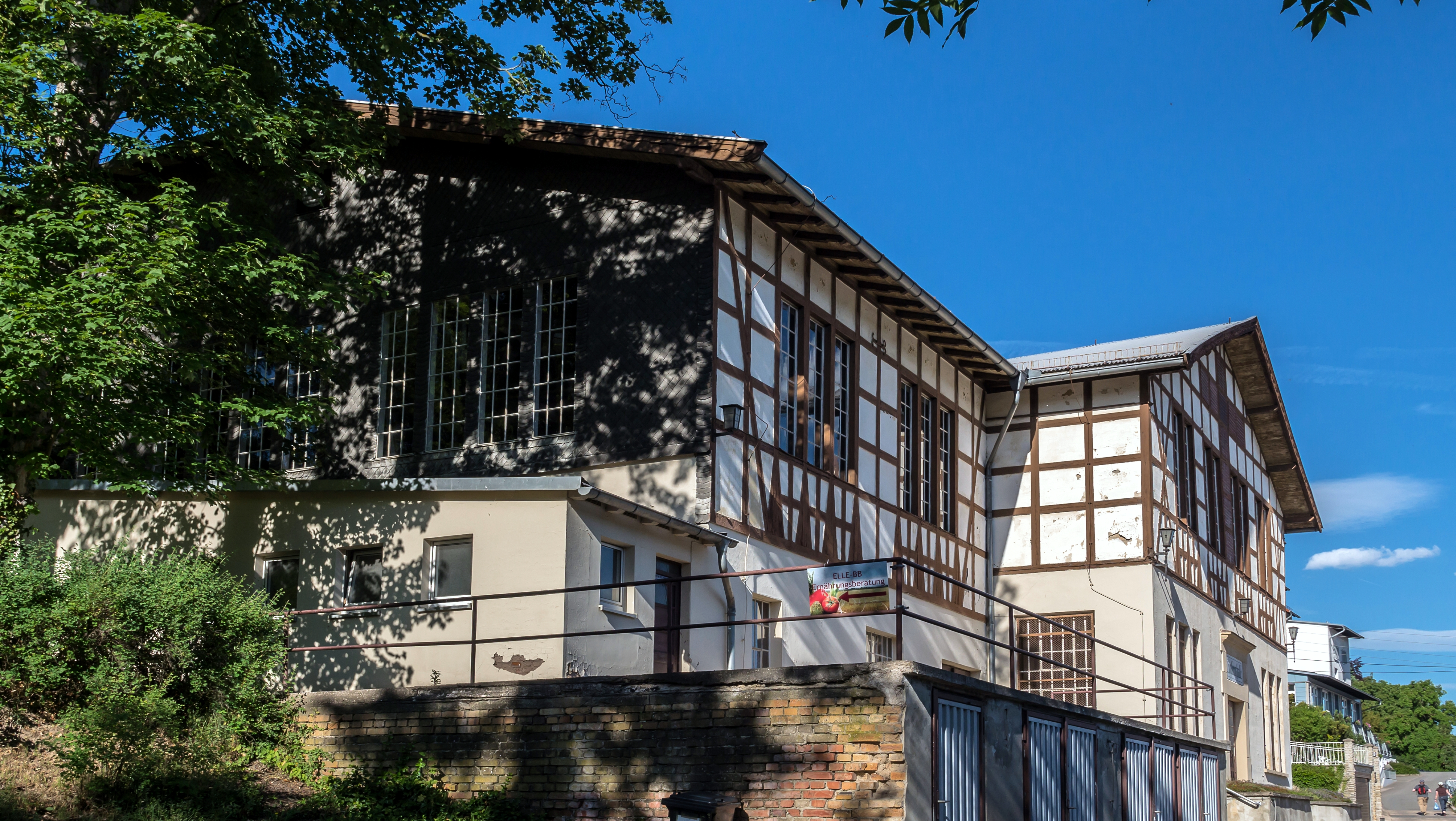 Denkmalgeschützte Konferenzhalle der Deutschen Evangelischen Allianz Bad Blankenburg Esplanade10